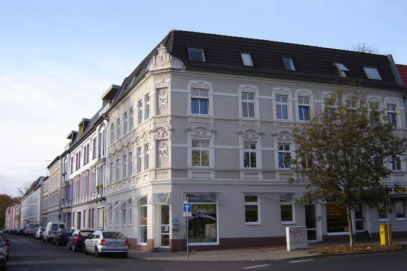 Häuserzeile in Magdeburg-Lemsdorf